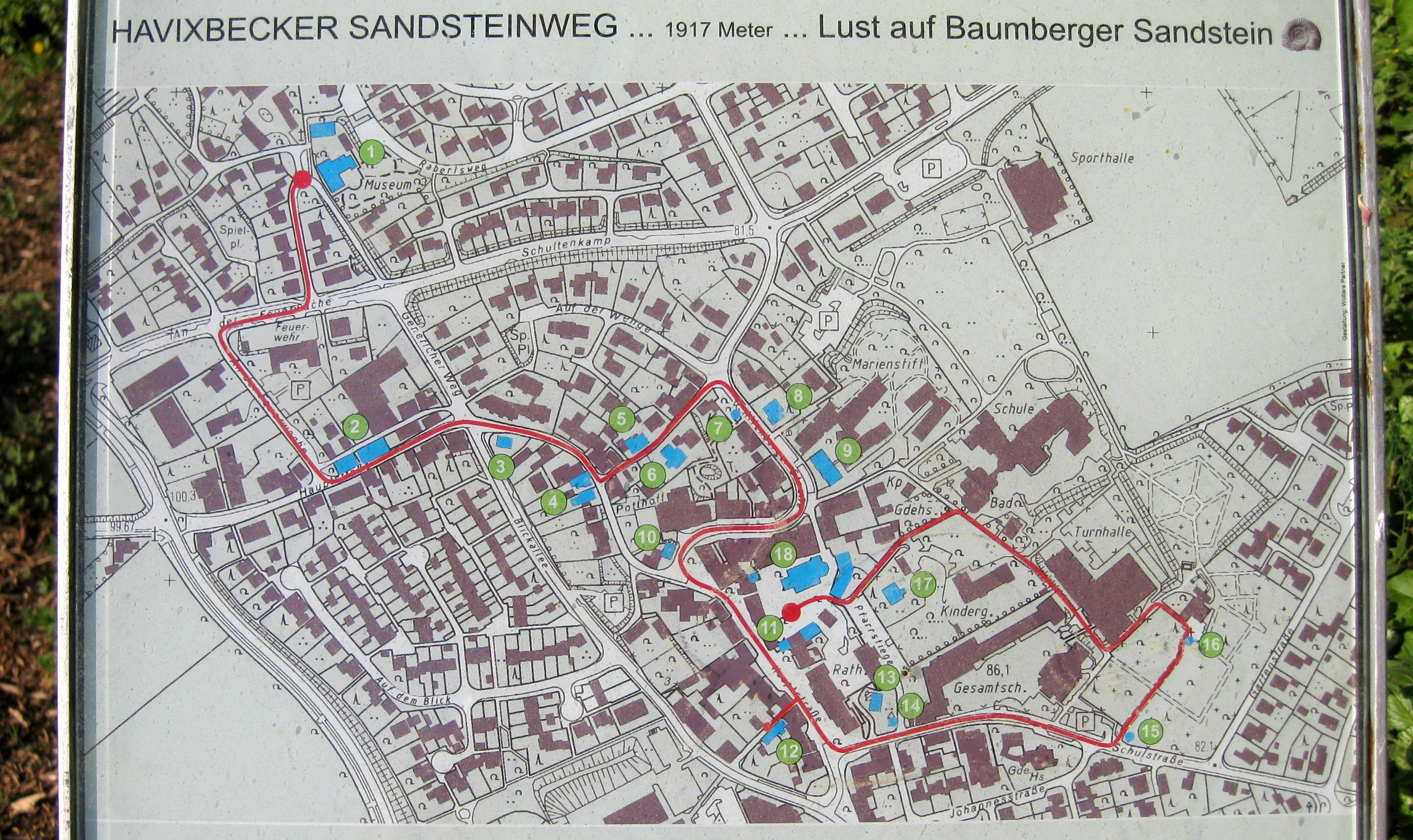 Havixbecker Sandsteinweg, Tafel am Rande des Weges vom Baumbergersandsteinmuseum in Havixbeck